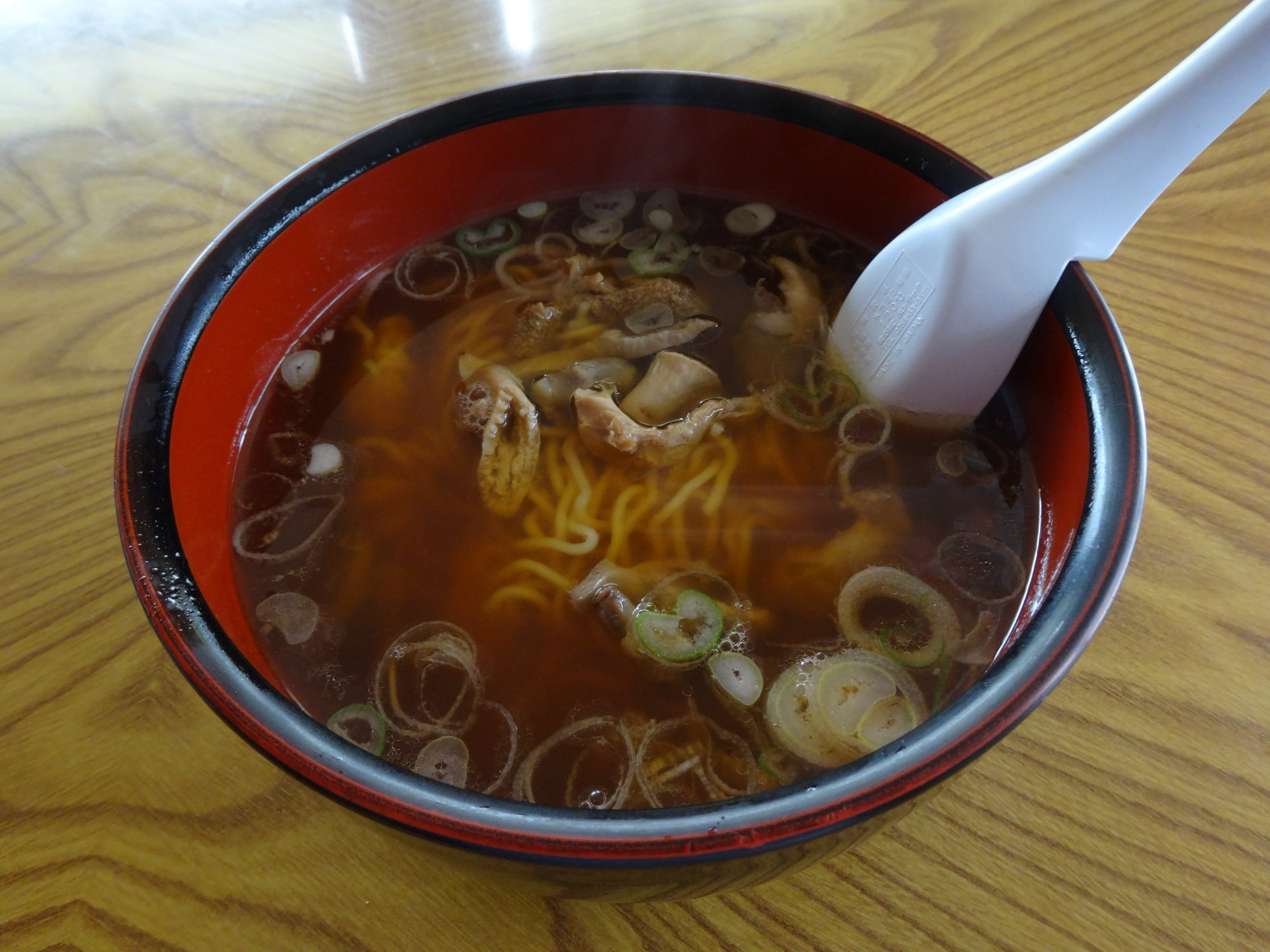 とりもつラーメン（山形県新庄市、急行食堂にて撮影）